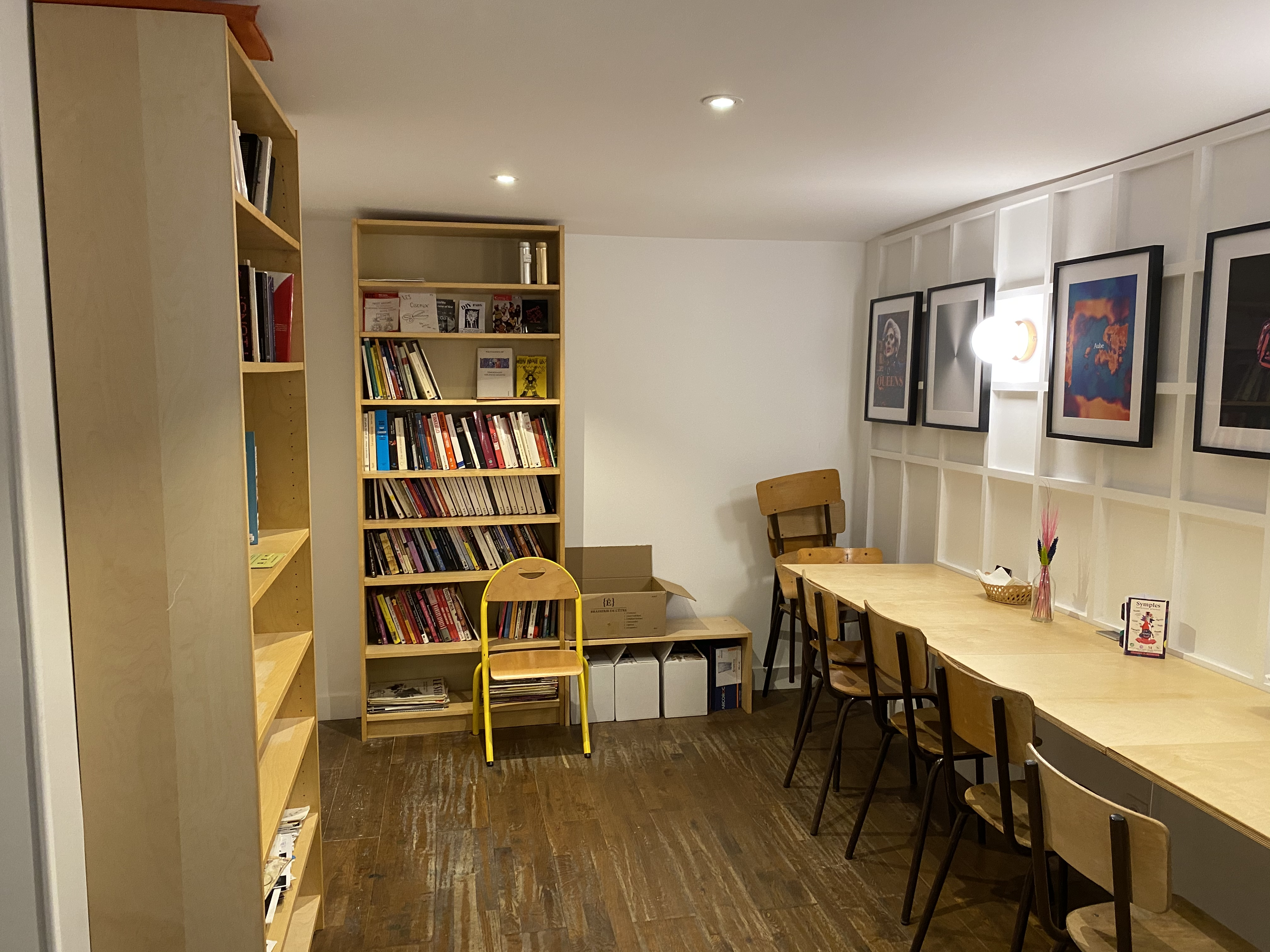 Les sans pagEs à l’inauguration de la Constellation à Paris le 18 juillet 2020